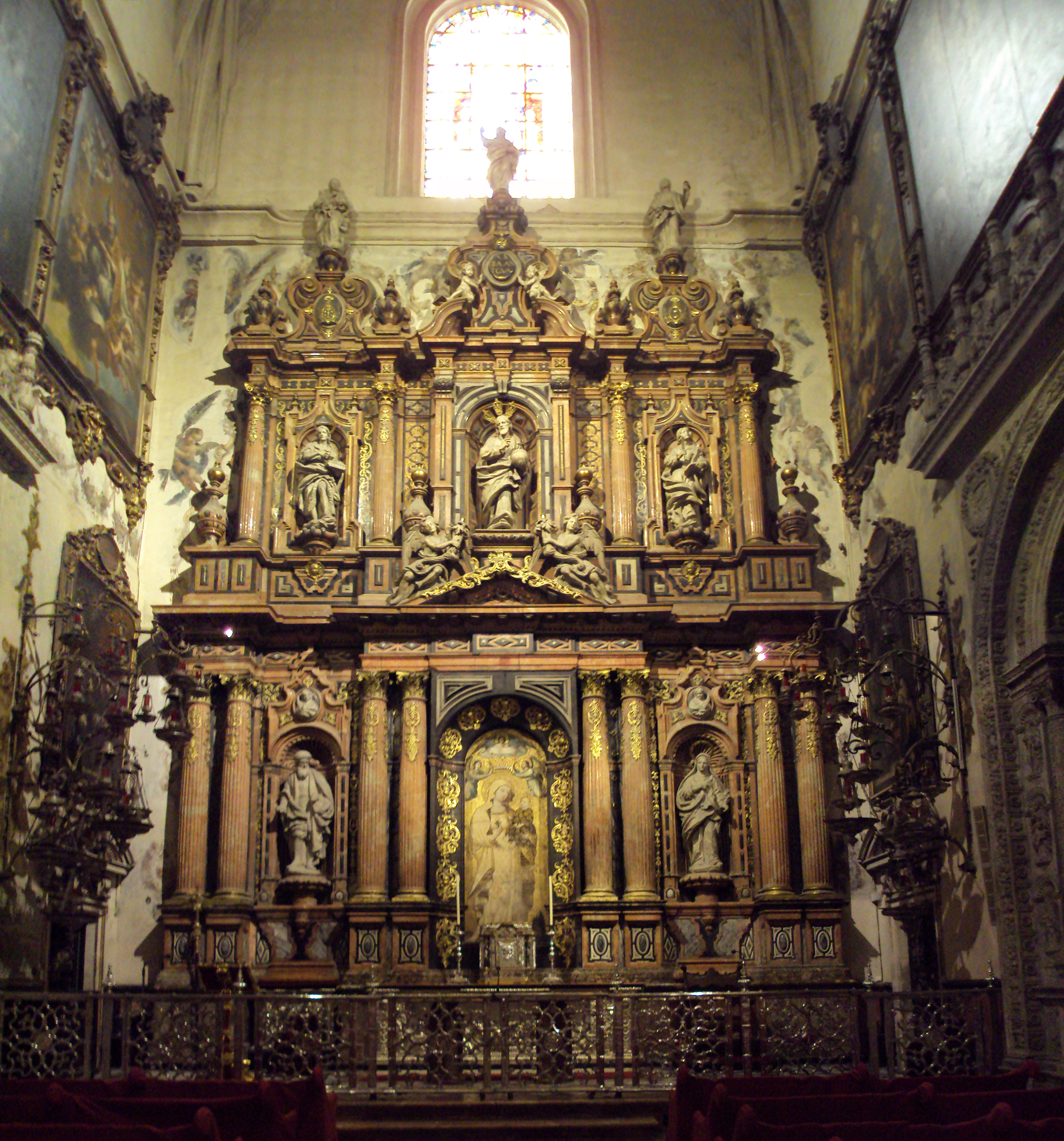 Retablo de la capilla de la Virgen de la Antigua de la catedral de Sevilla, (España).